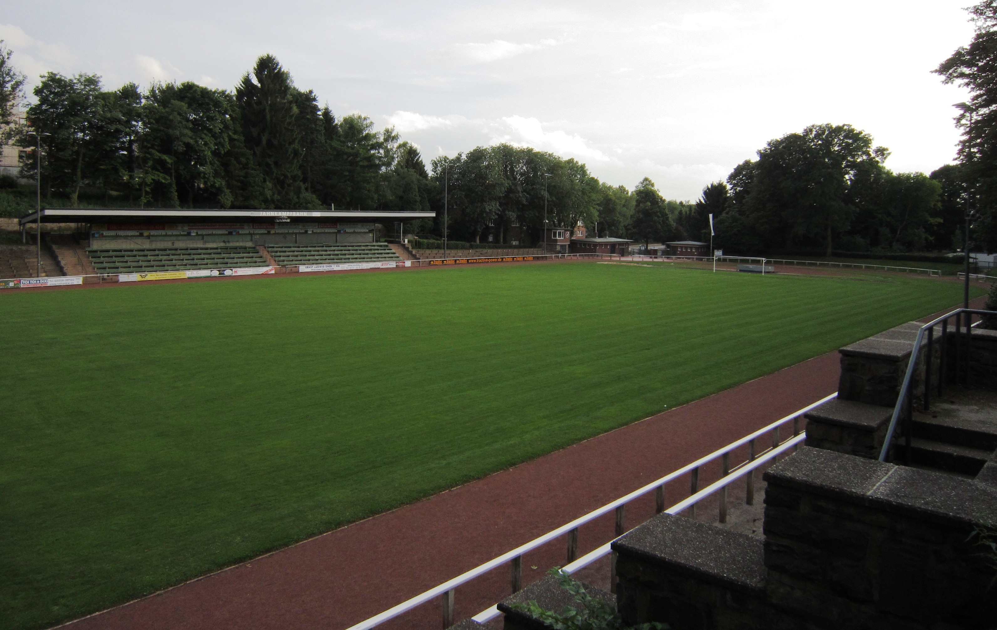 Jahnkampfbahn in Solingen-Wald, aufgenommen im Sommer 2015